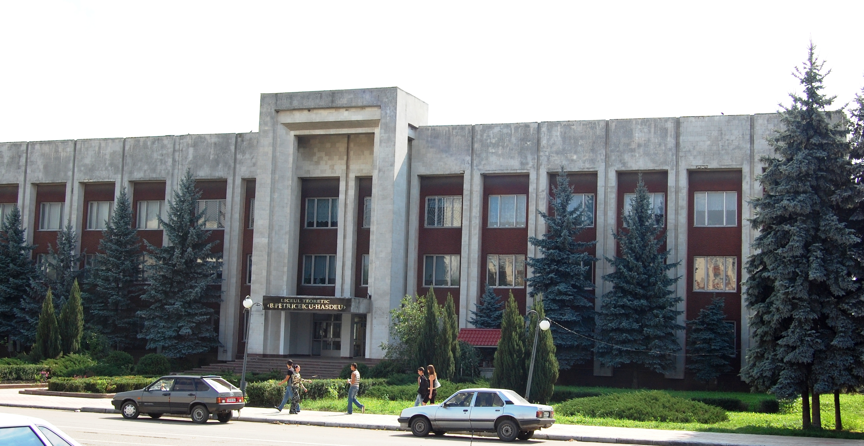 Cladirea Liceului Bogdan Petriceicu-Hasdeu